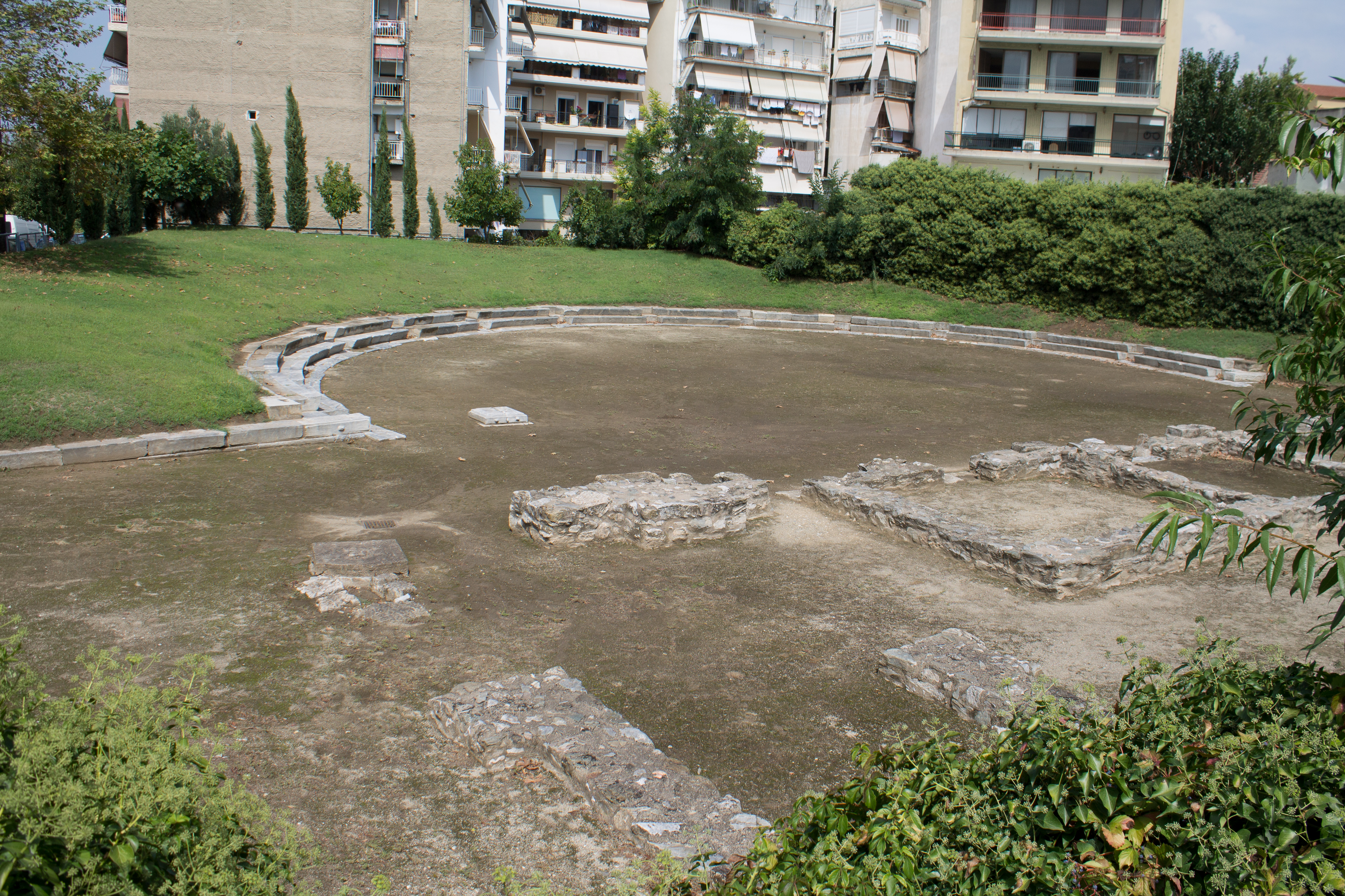 Συνολική άποψη αρχαίου θεάτρου«Αρχαίο θέατρο Β΄ Λάρισας»